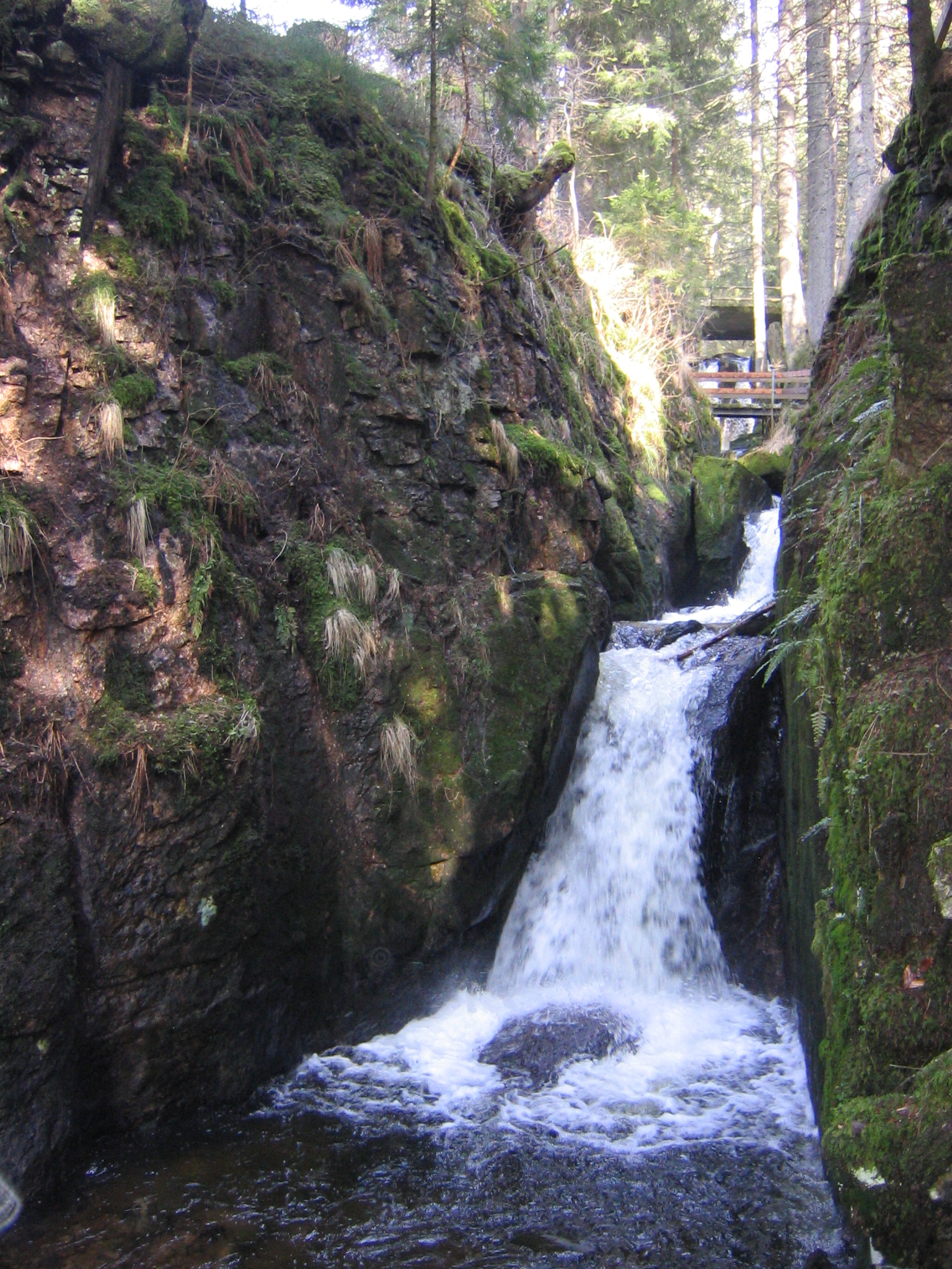 Wasserfälle in Menzenschwand